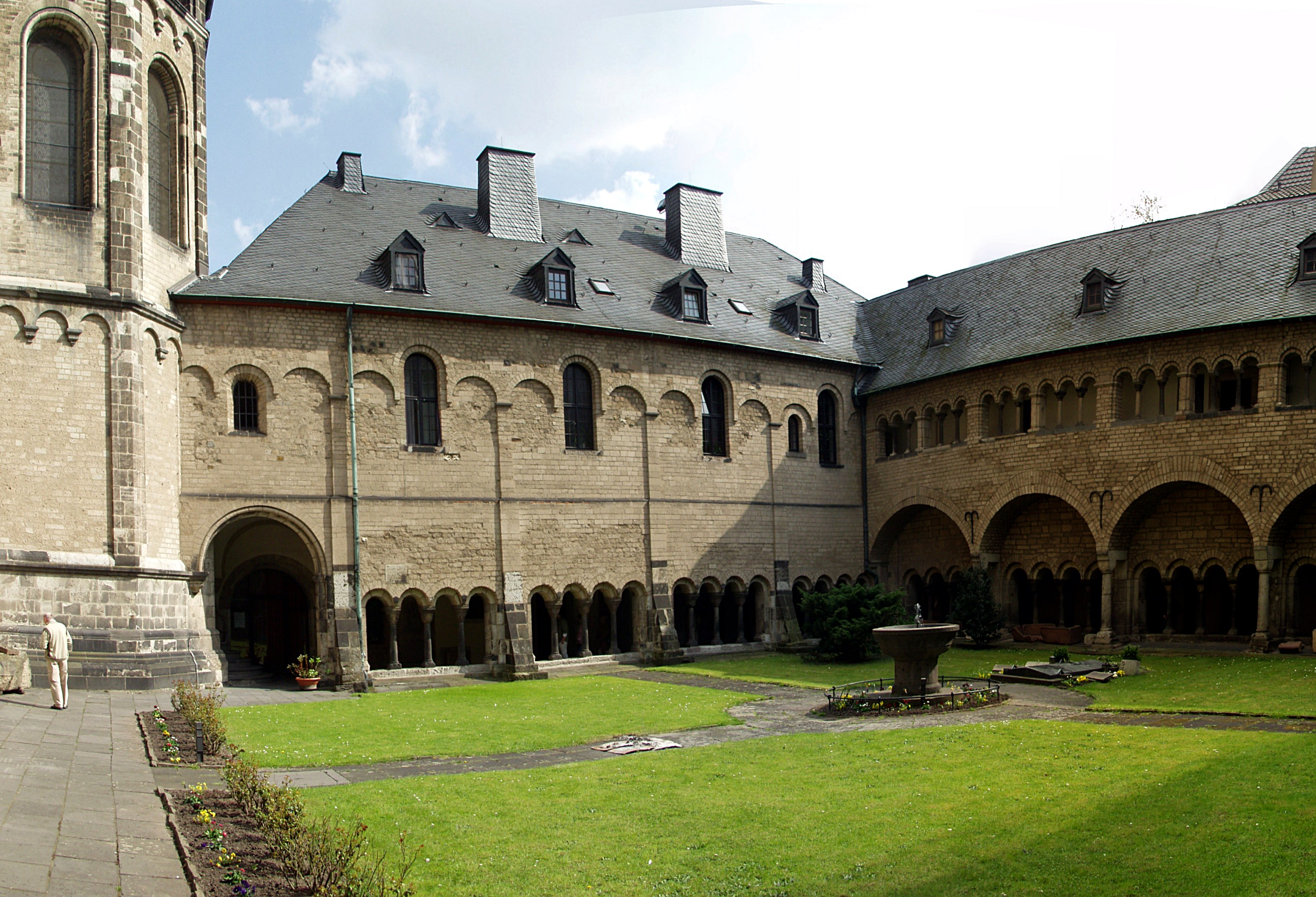 Kreuzgang im Bonner Münster.